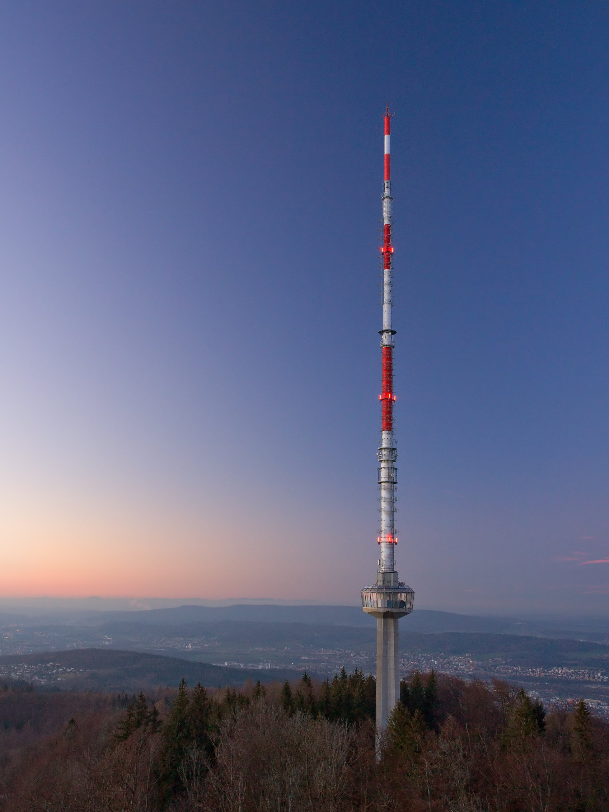 Der Sendeturm auf dem Uetliberg bei Zürich, Schweiz